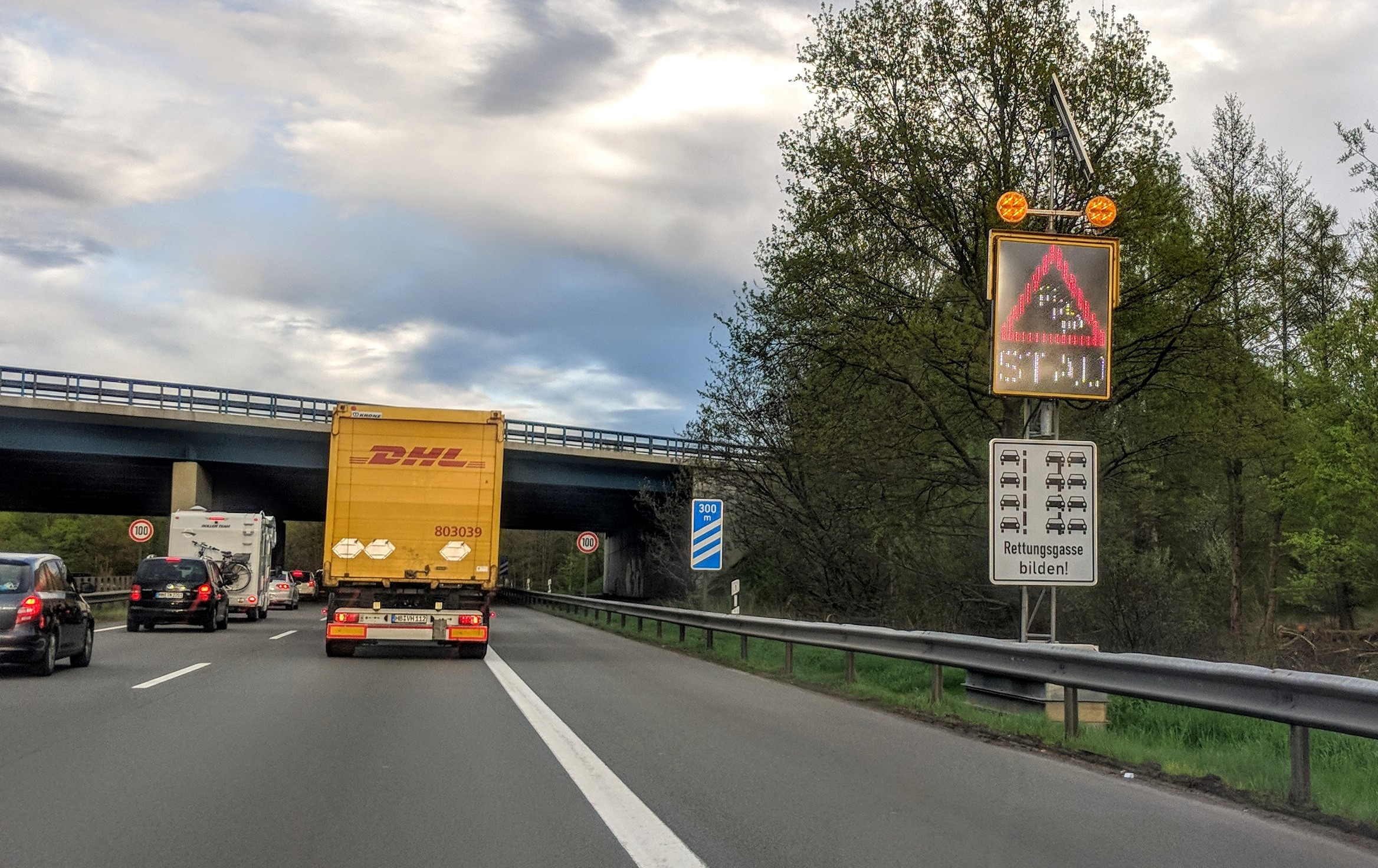 Hinweise zur Bildung der Rettungsgasse auf der A1 in Hamburg in staugefährdeten Bereichen